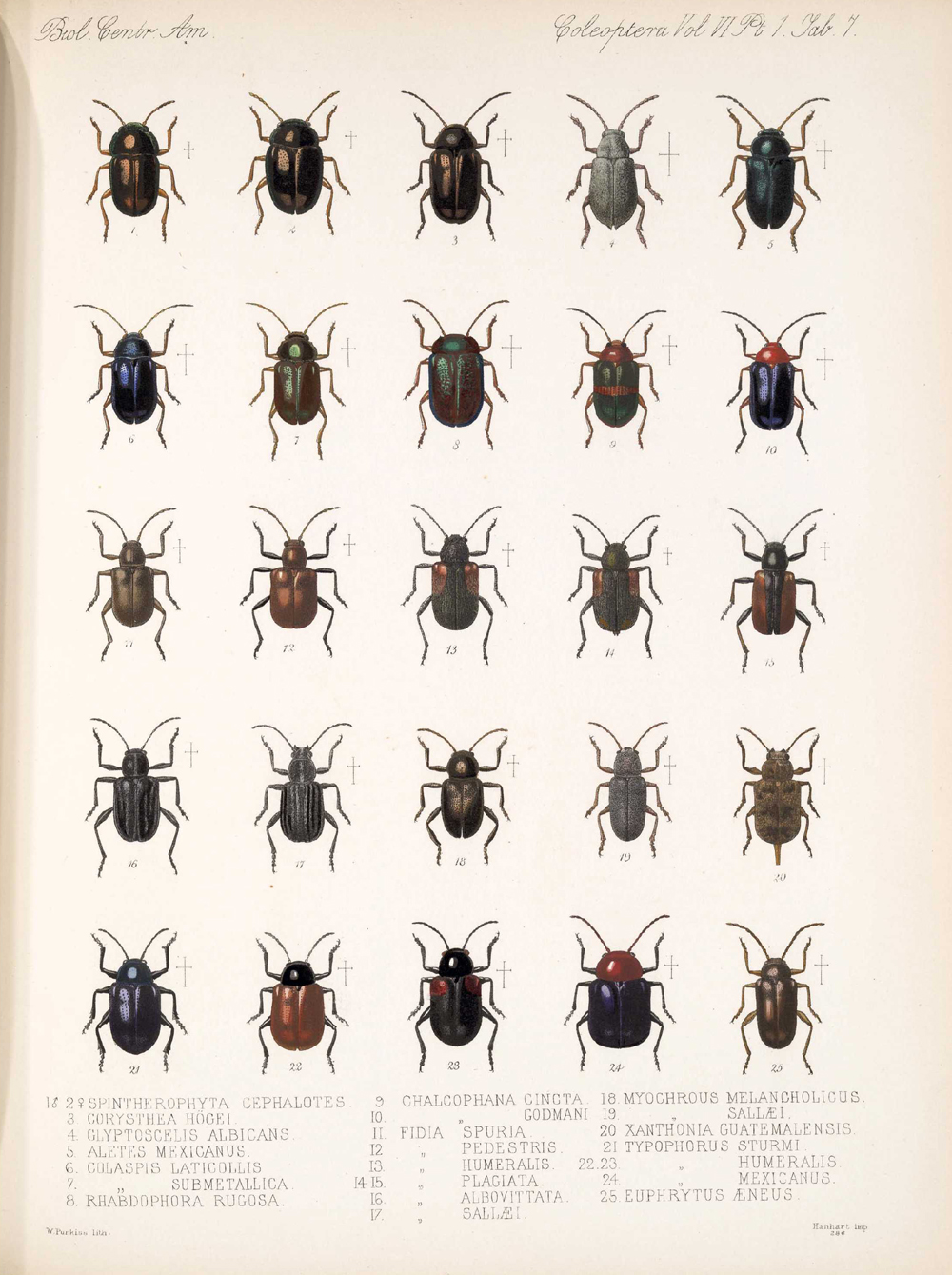 martinjacobyphytophaga.